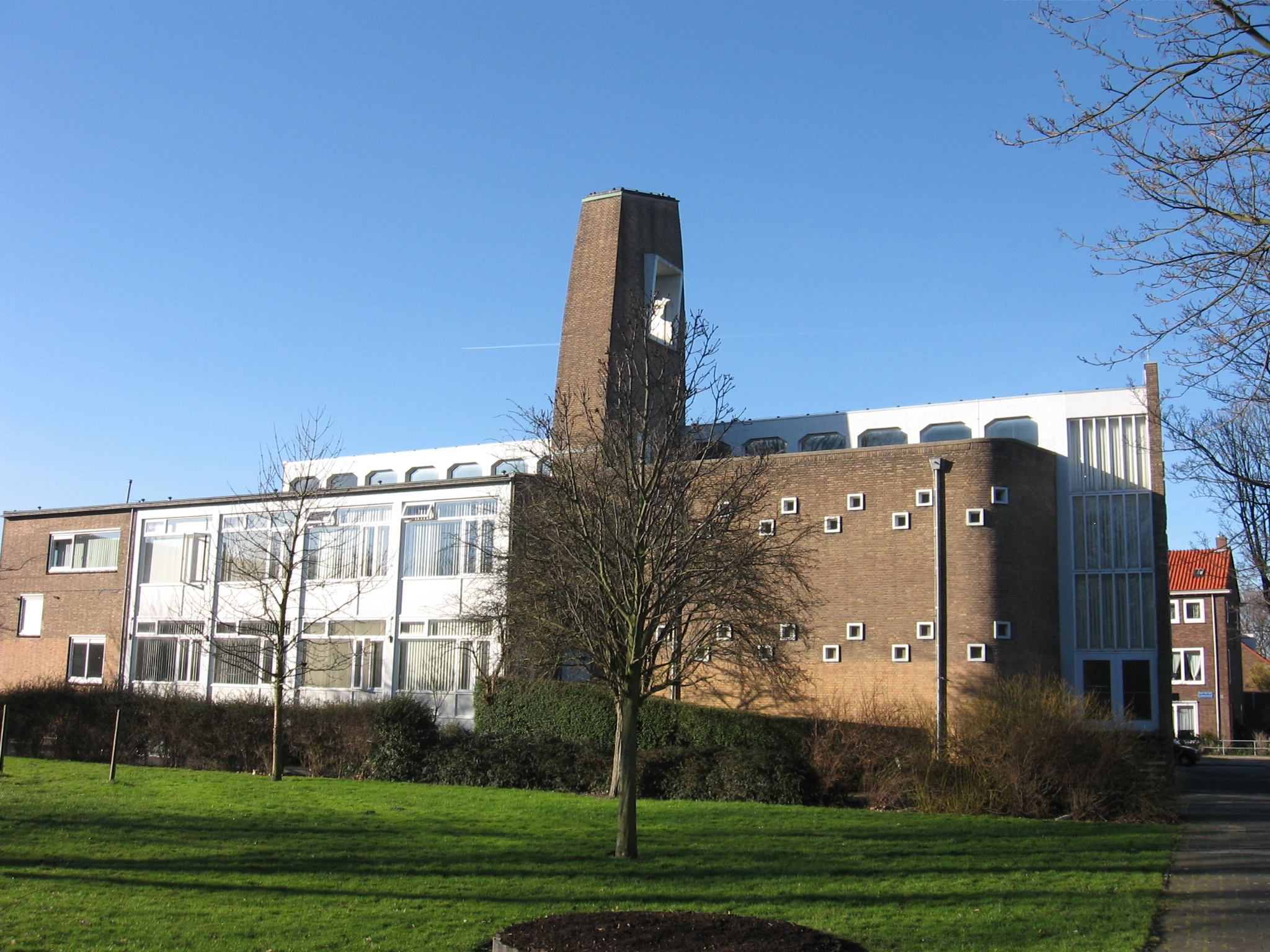 Hofkerk